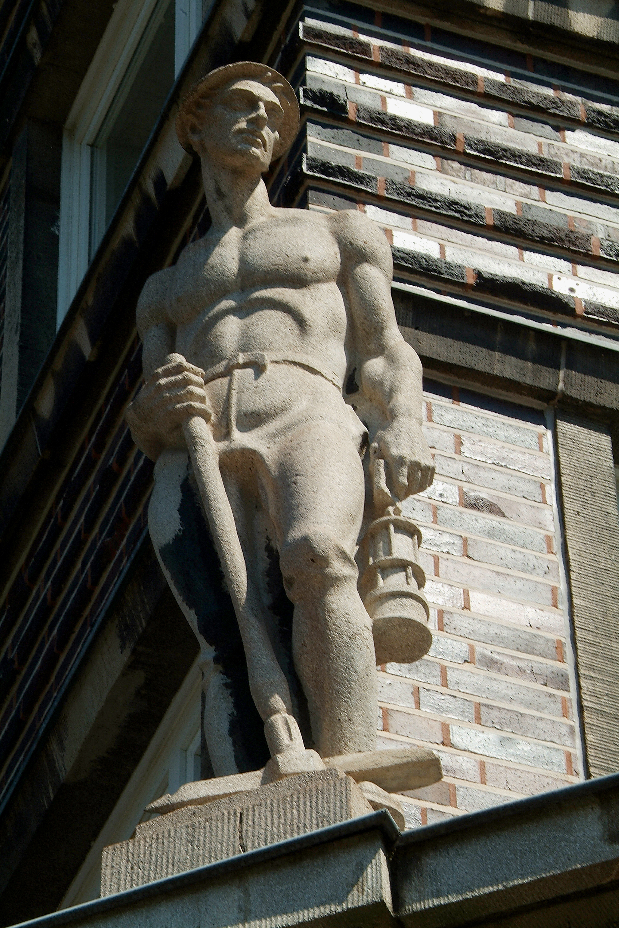 Lebensgroße Skulptur eines Bergmanns über den Arkaden am mittigen Dreieckserker vom Hochhaus Glückauf in der Südstadt von Hannover ...